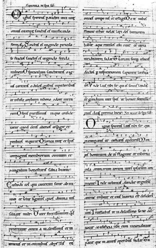 O Ignis Spiritus